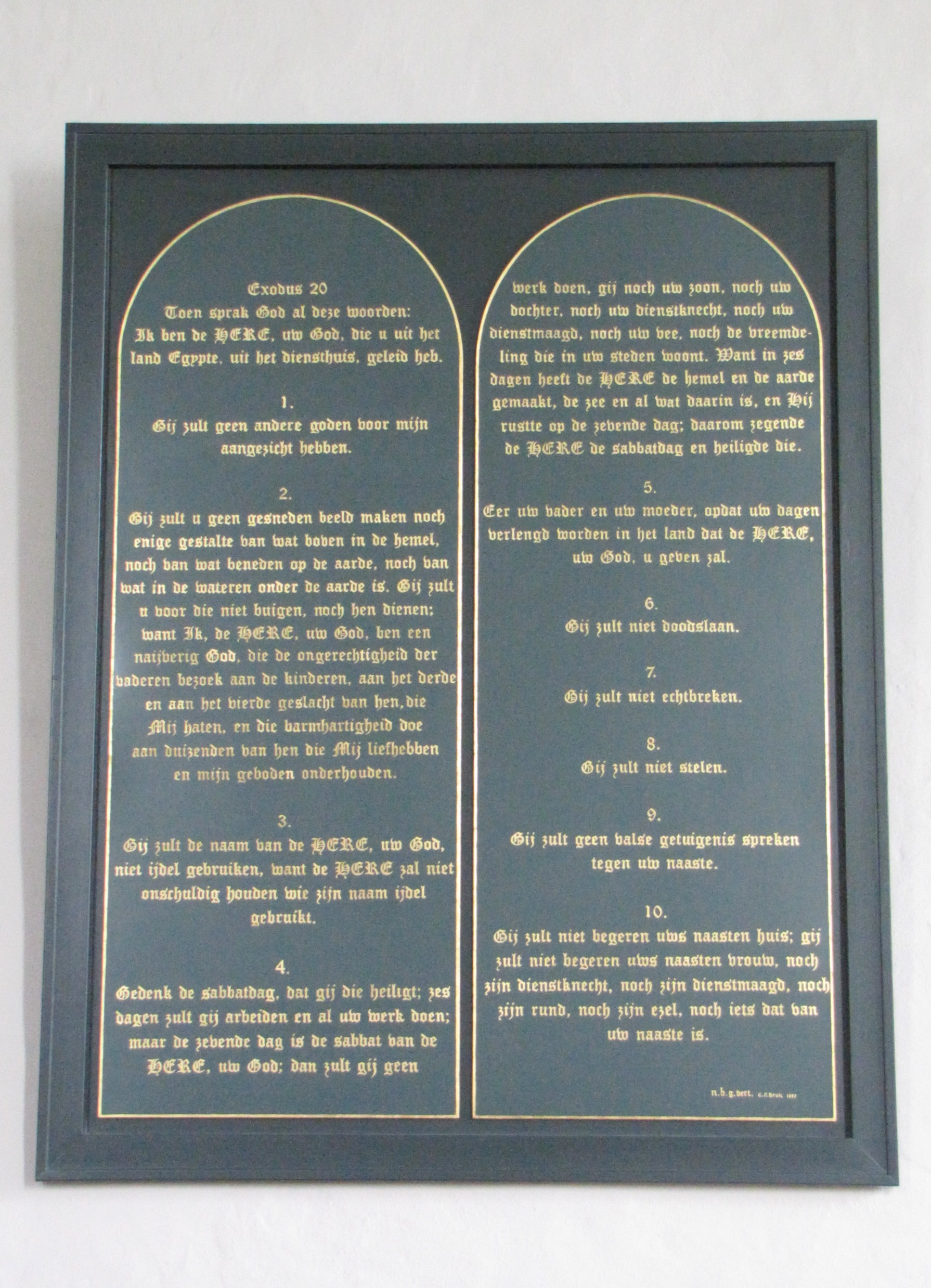 Oude Mauritius (n.h.) in Silvolde, Oude IJsselstreek. Tien geboden.